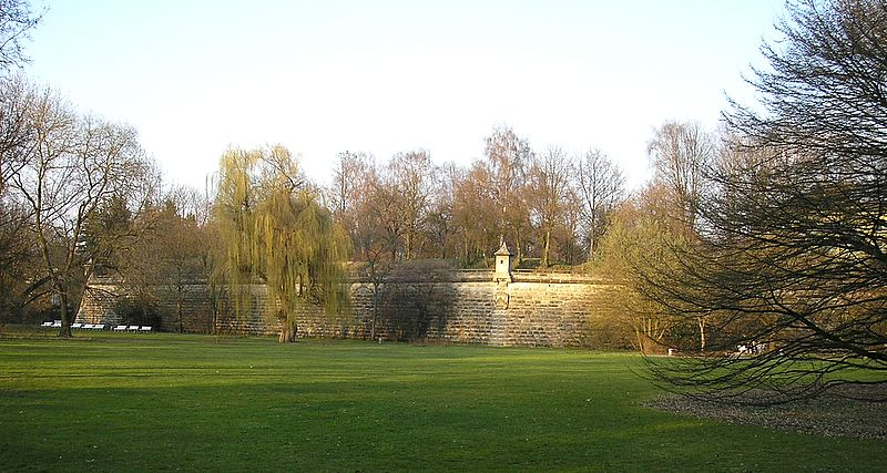 Festung Forchheim (Oberfranken). St. Valentini-Werk von Westen. Eigene Aufnahme, März 2006 / Fortress Forchheim (Upper Franconia, Germany). Bastion St. Valentini from the west. Own photo, March 2006